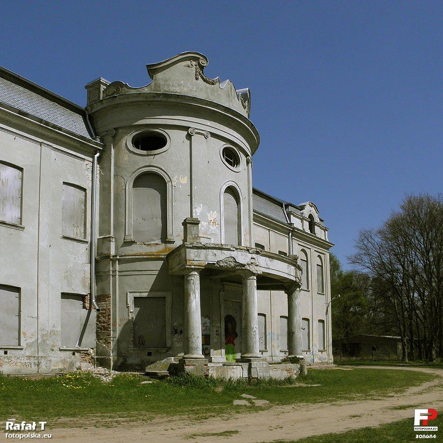 Pałac od strony skarpy.